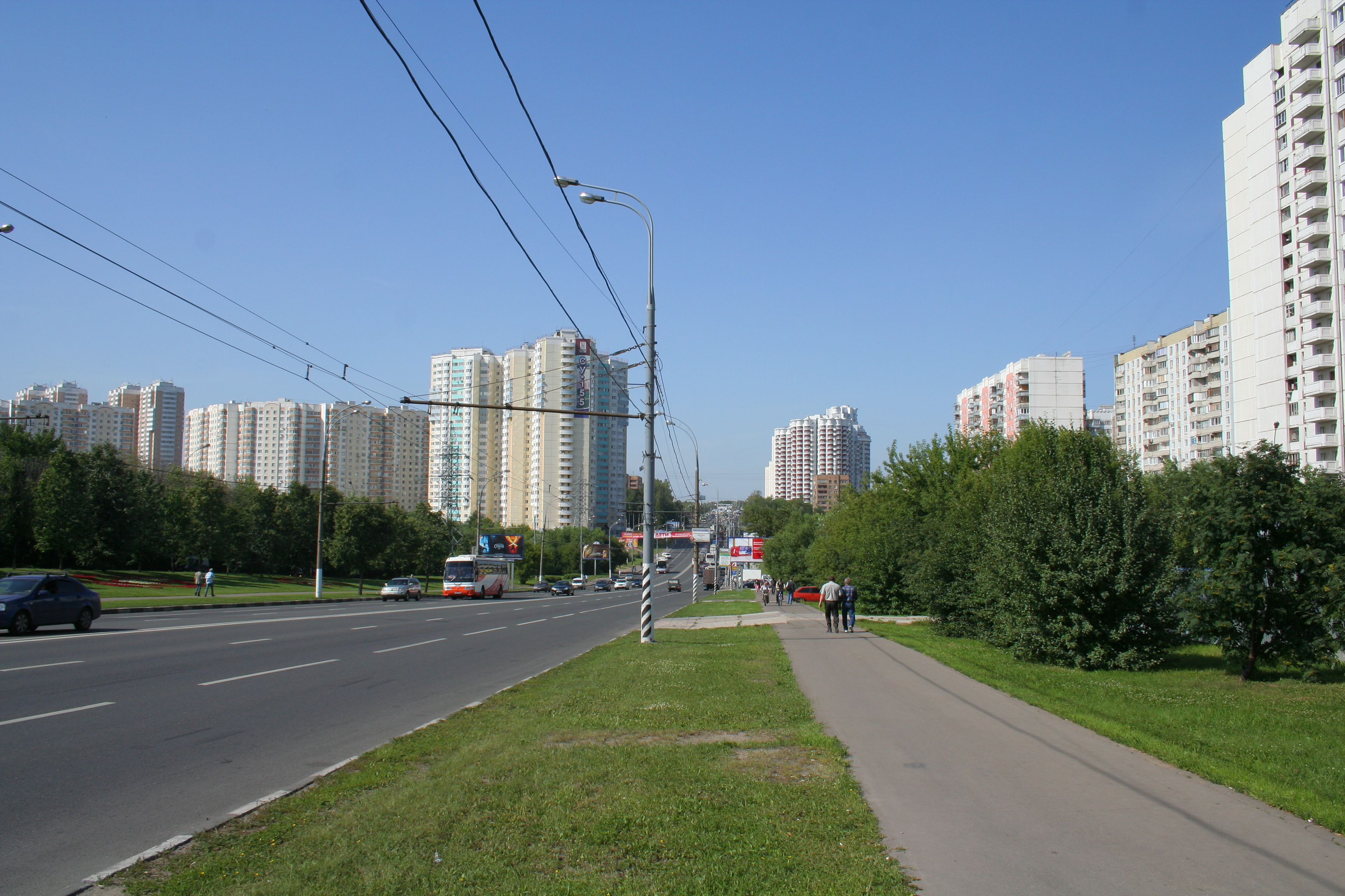 Der Proletarski-Prospekt im Moskauer Stadtteil Moskworetschje-Saburowo.